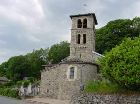 église romane de vernay rhône